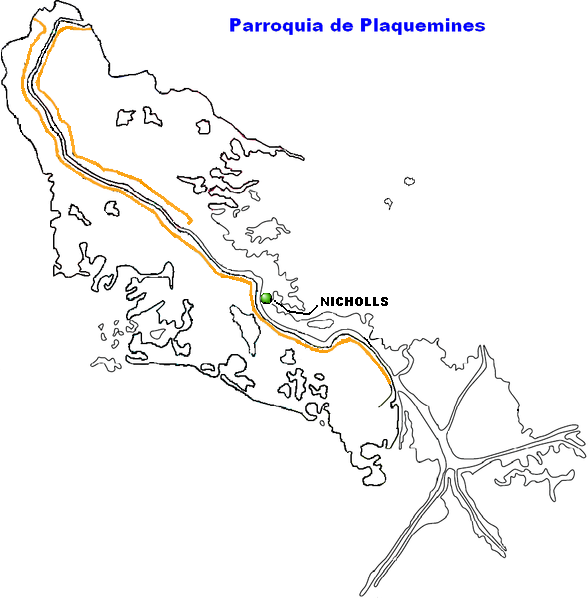 Nicholls, Louisiana.